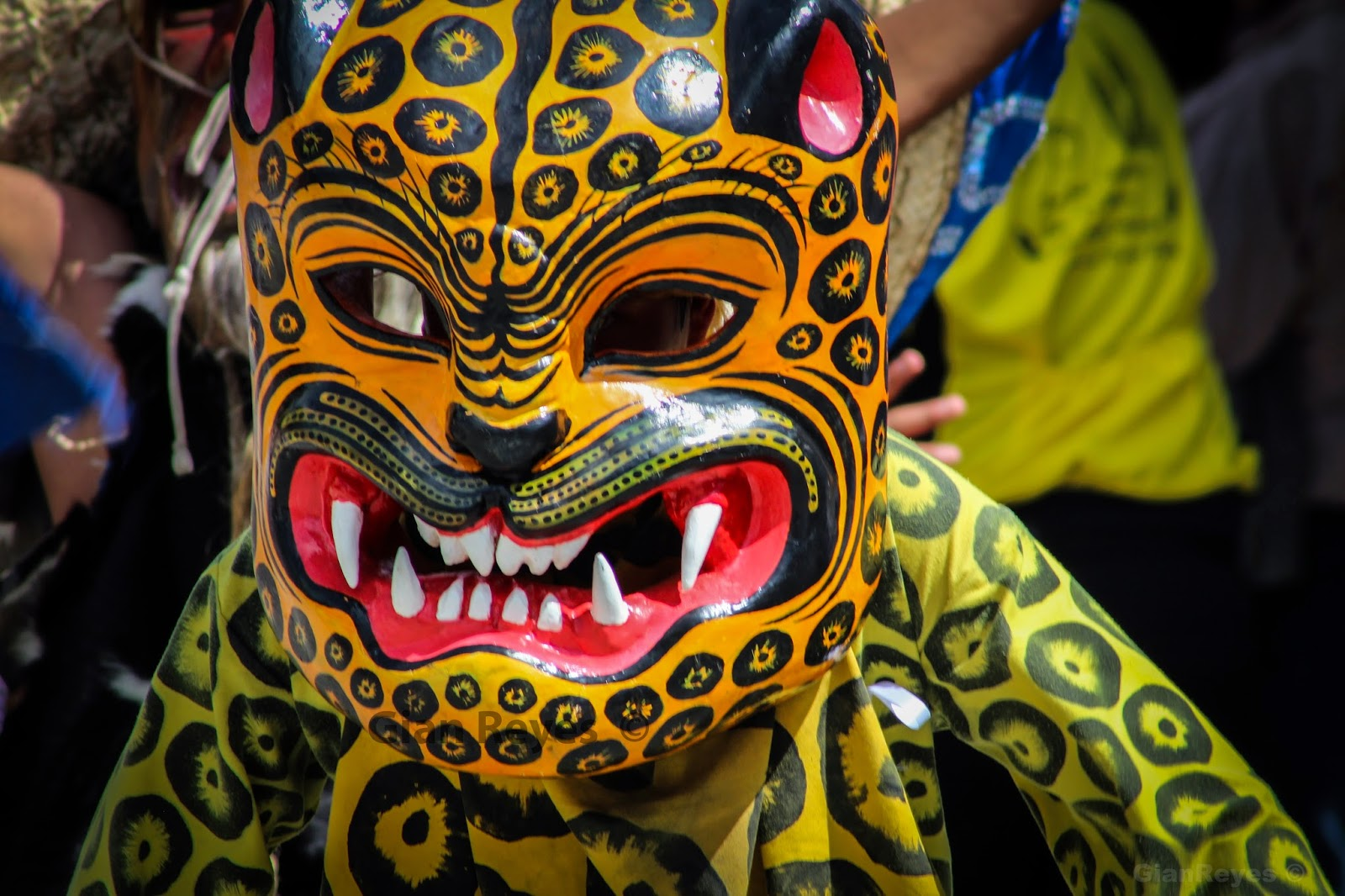 Tecuanes y jaguares